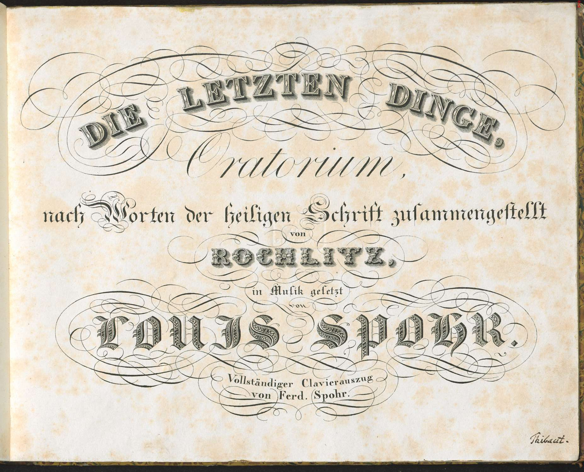 Titelblatt des Oratoriums „Die letzten Dinge“ von Louis Spohr, Klavierauszug von Ferdinand Spohr aus dem Besitz von Anton Friedrich Justus Thibaut